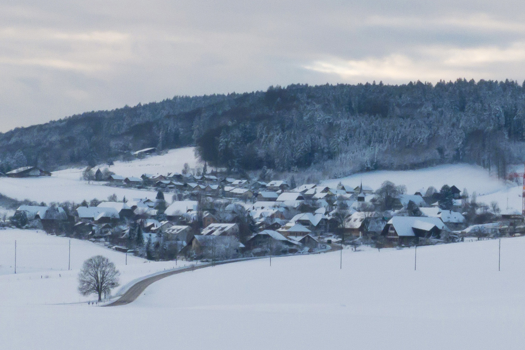 Meikirch im Schnee, von Süden